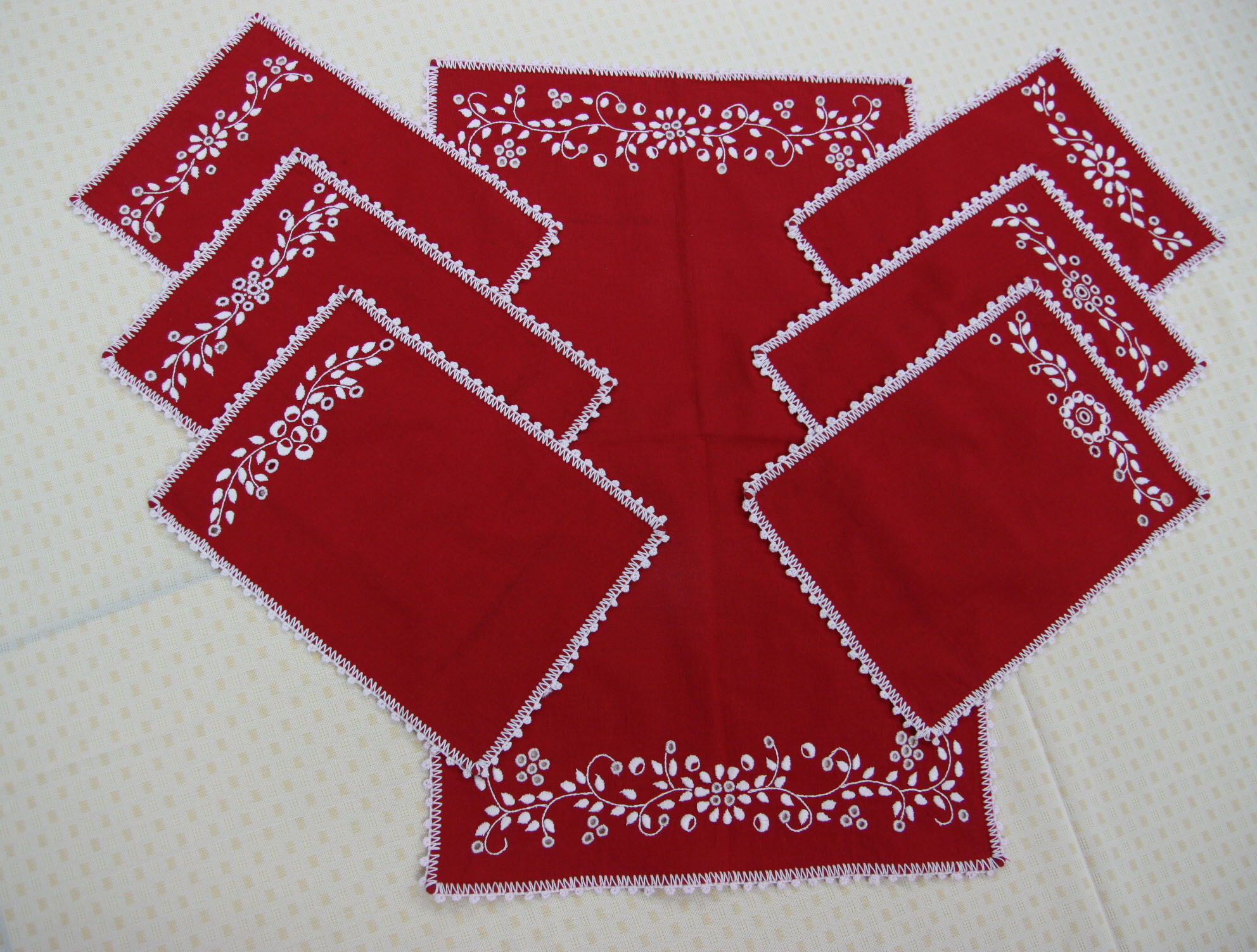 Zdjęcie przedstawia obrus i serwetki ozdobione haftem kujawskim. Hafciarka, Karolina Dworek, zdobywa wyróżnienia w konkursach związanych z promocją sztuki ludowej. Fotografię wykonano podczas zajęć animacyjnych dla pokolenia 50+ w ramach projektu Polska Cyfrowa Równych Szans w Gminnej Bibliotece Publicznej w Rojewie.